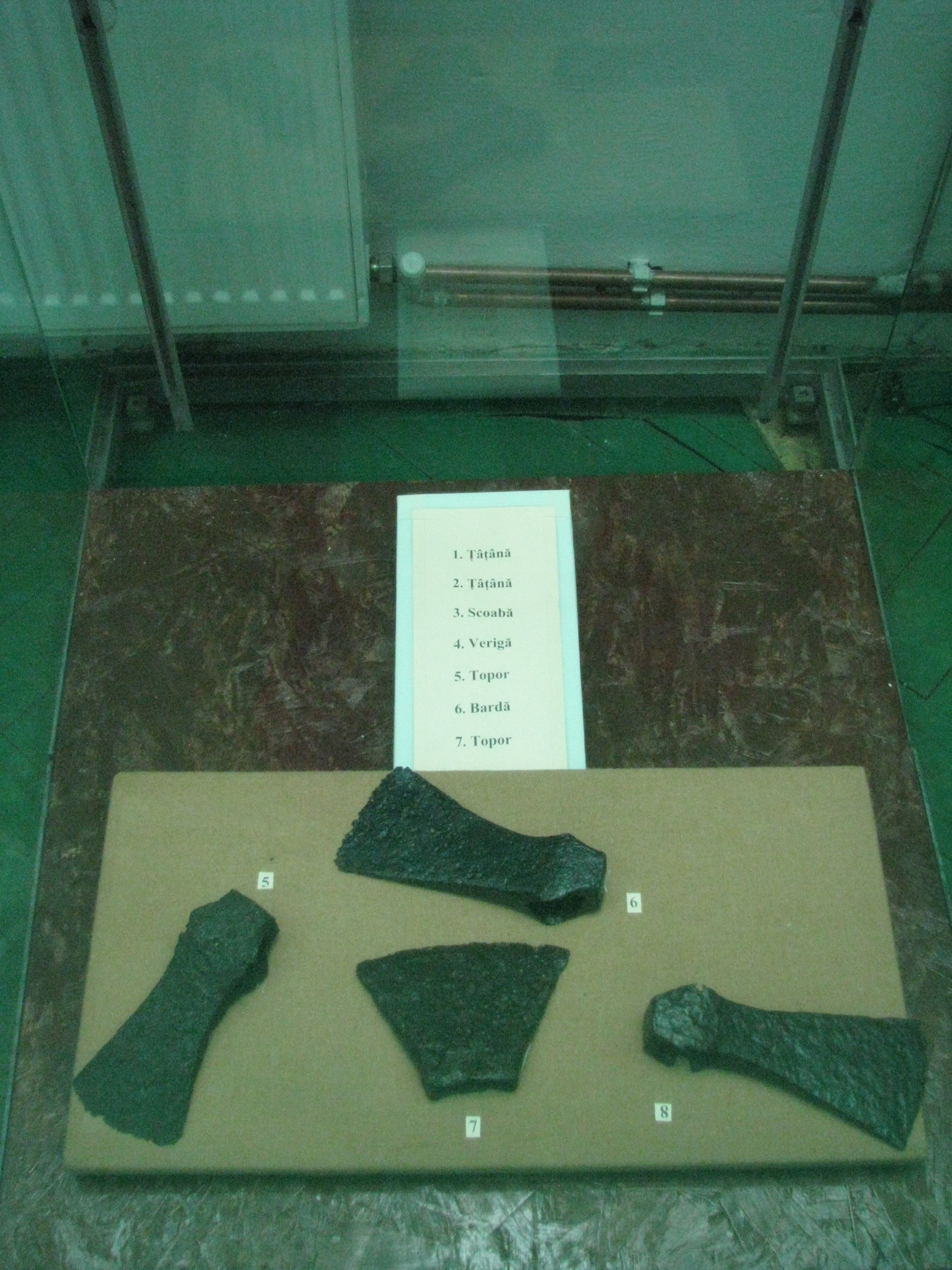 Orăştie Ethnography Museum 2011